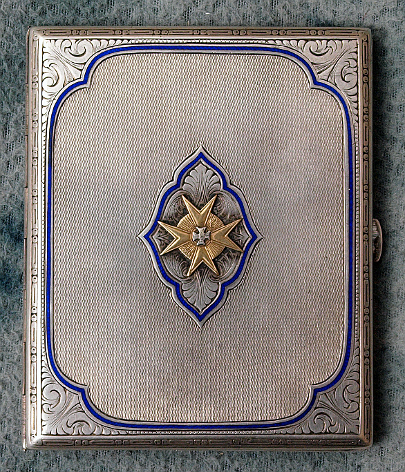 Awers pamiątkowej papierośnicy podarowanej dowódcy Pułku na zakończenie służby przez jego kadrę oficerską. Na awersie widoczna miniaturka odznaki pułkowej. 1935 rok.